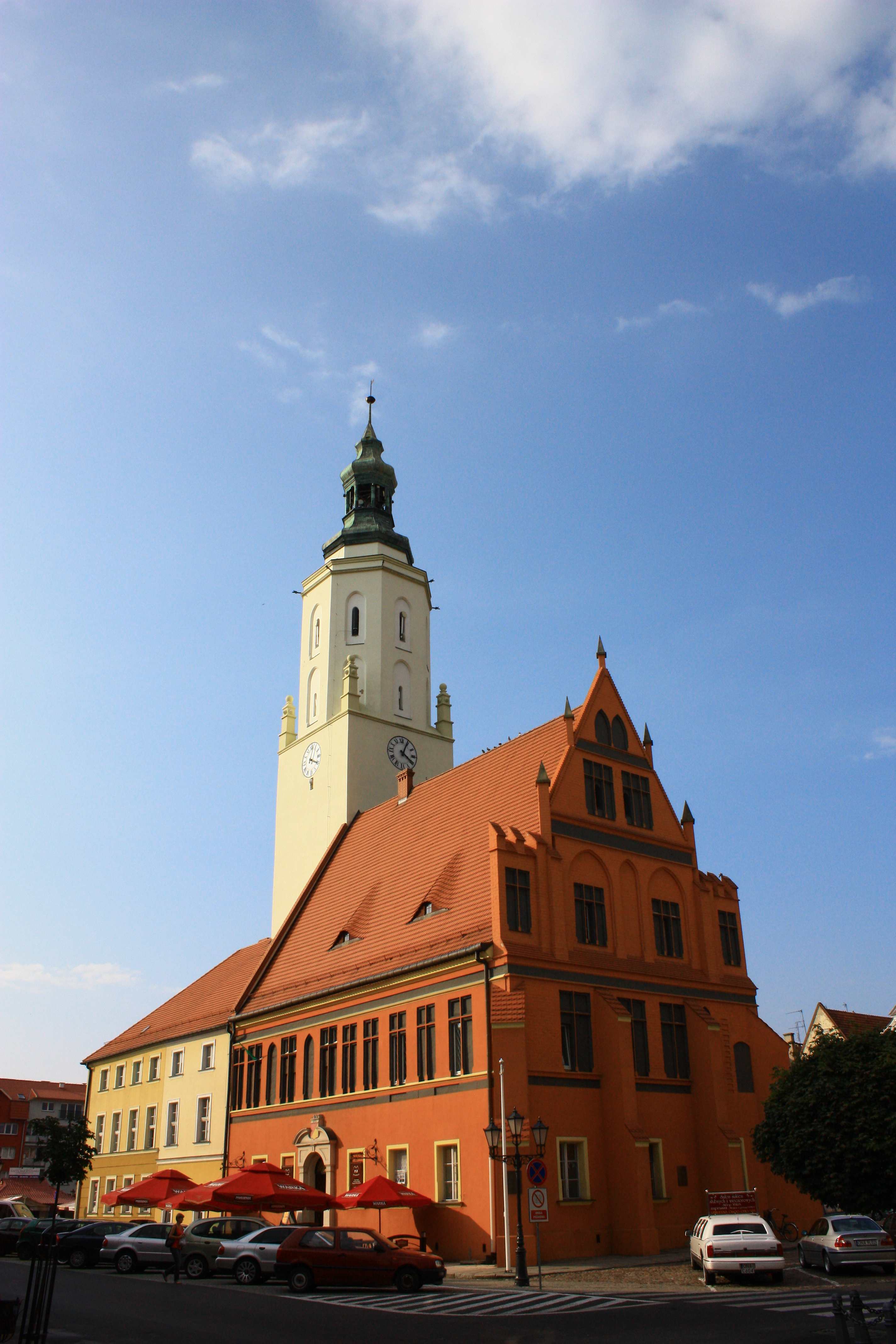 Namysłów, ratusz, 1374-1378, XV, XIX